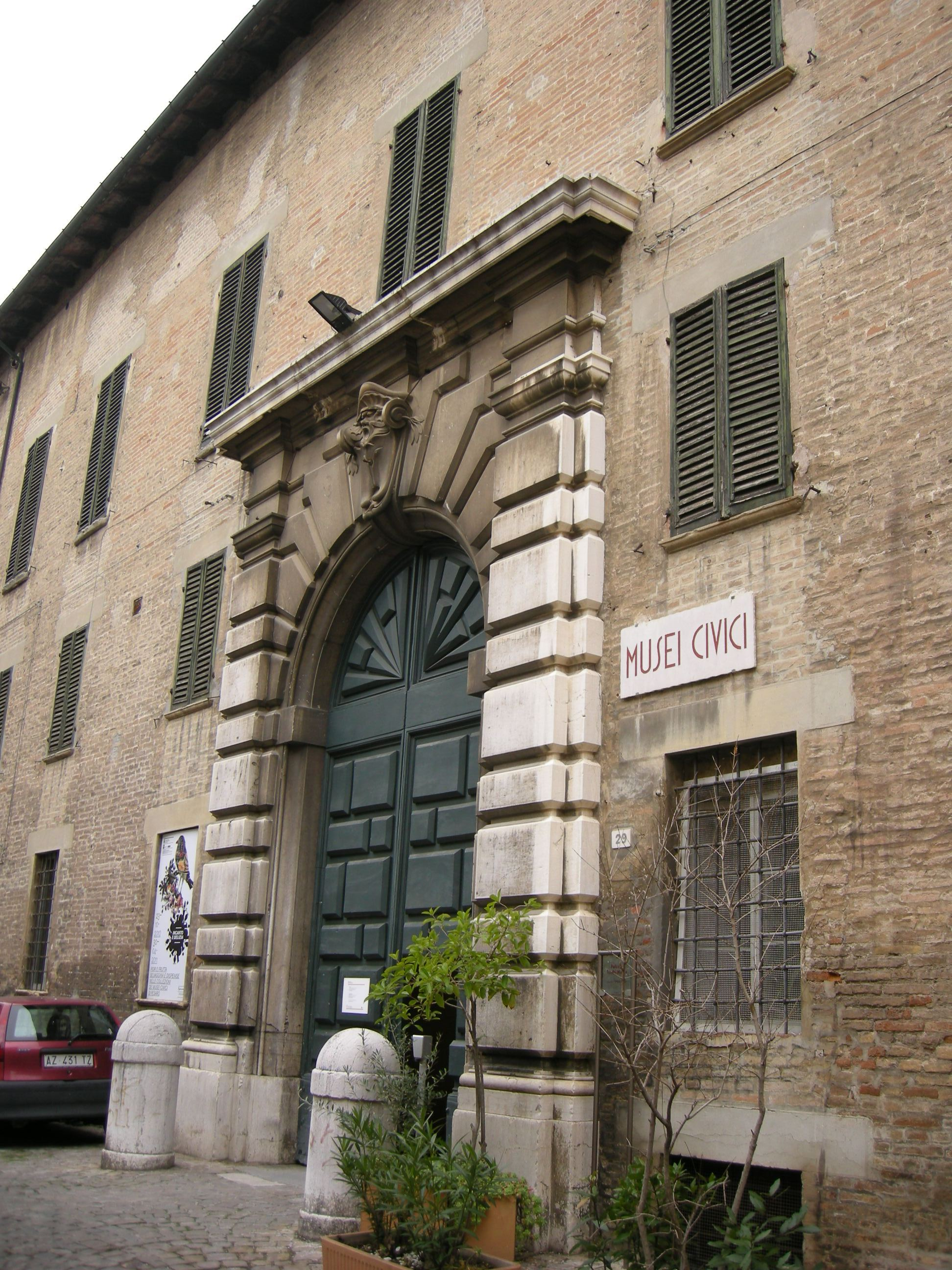 Pesaro, musei civici, entrata